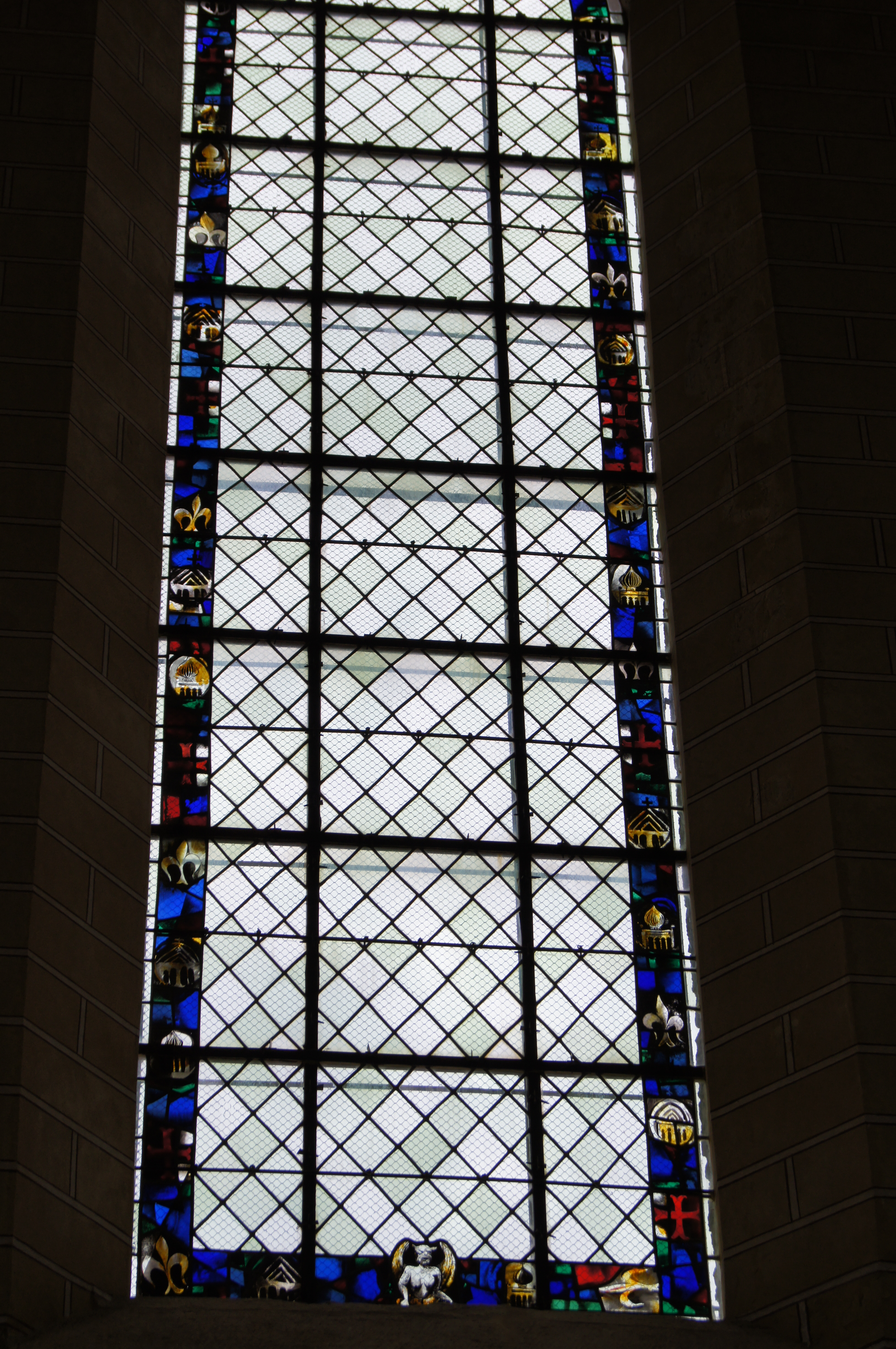 Vitrail au-dessus de l'entrée ouest de la chapelle de la commanderie de la Villedieu, suite à sa rénovation achevée en 2012